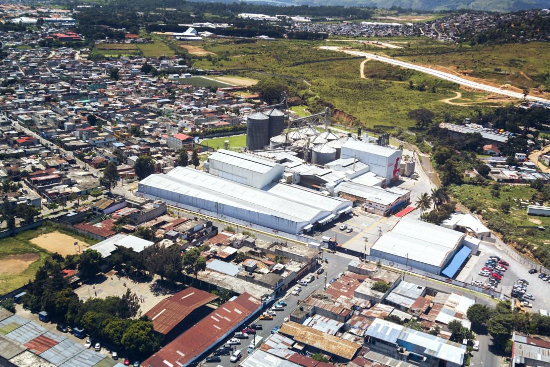 Industrias en Villa Nueva, Guatemala